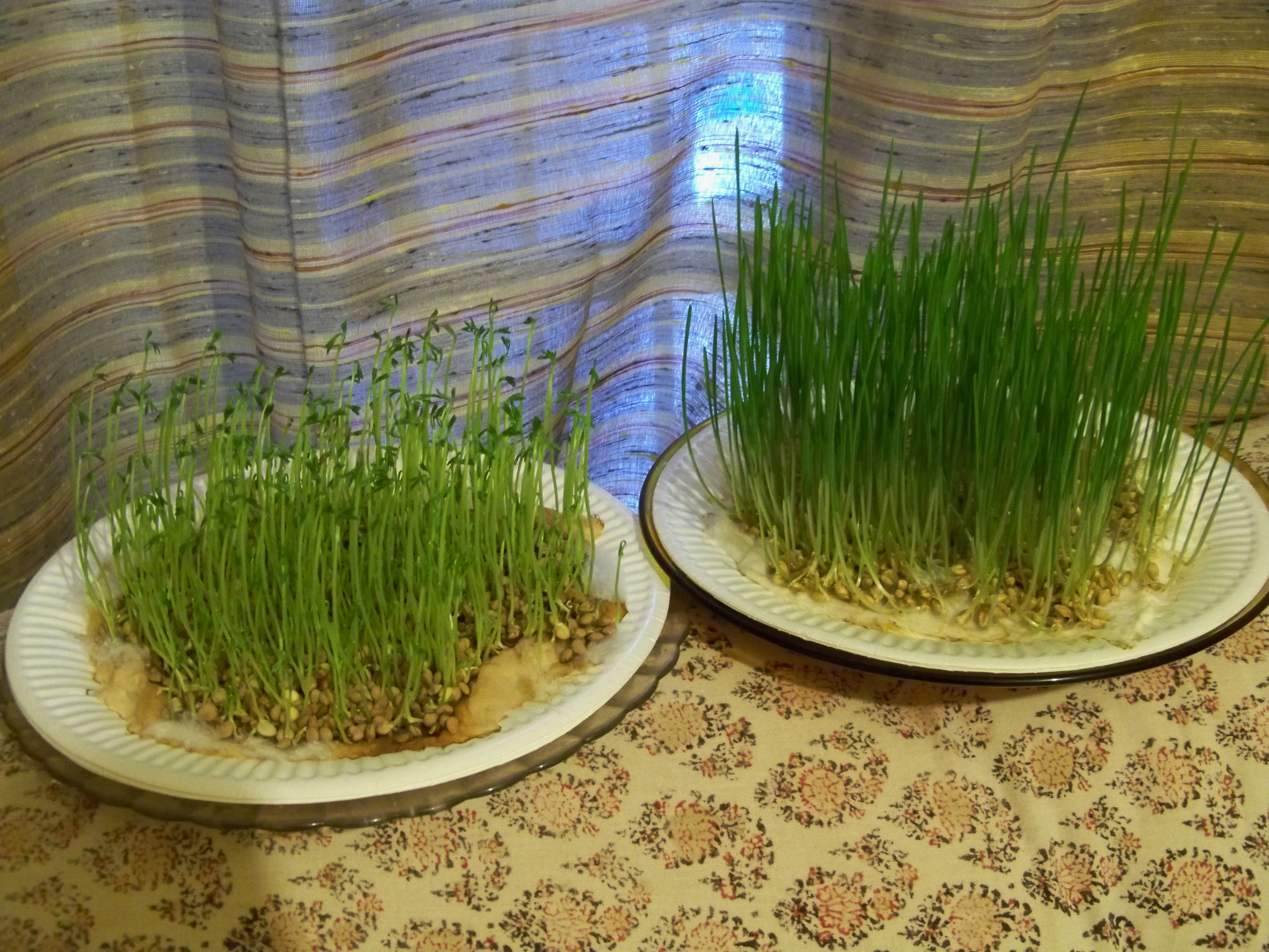 Blés et lentilles de la Sainte Barbe, traditions de Noël provençales